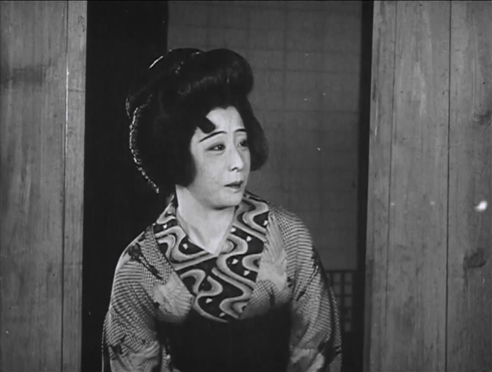 『怪談 狐と狸』、1929年